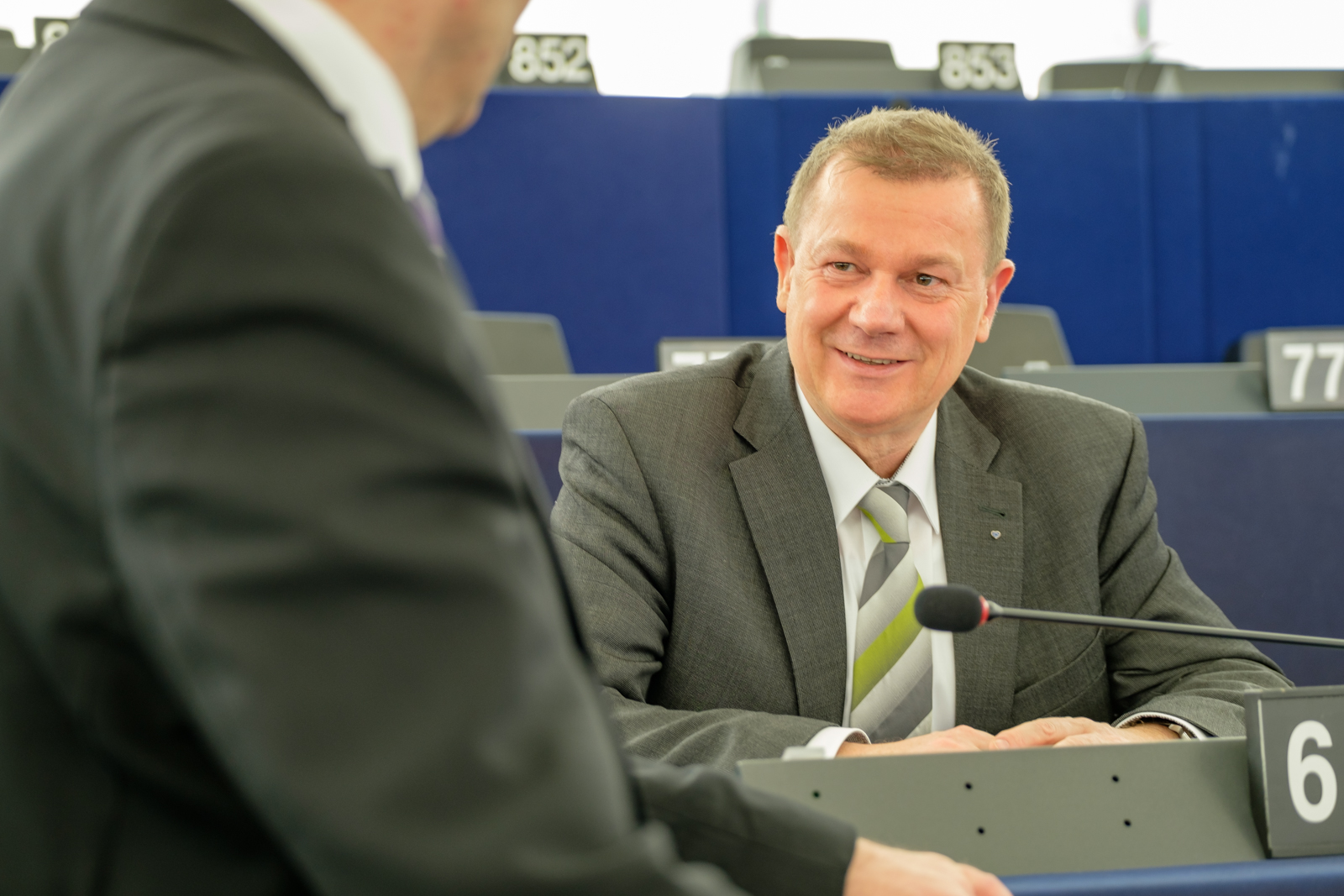 Dr. Markus Pieper MdEP